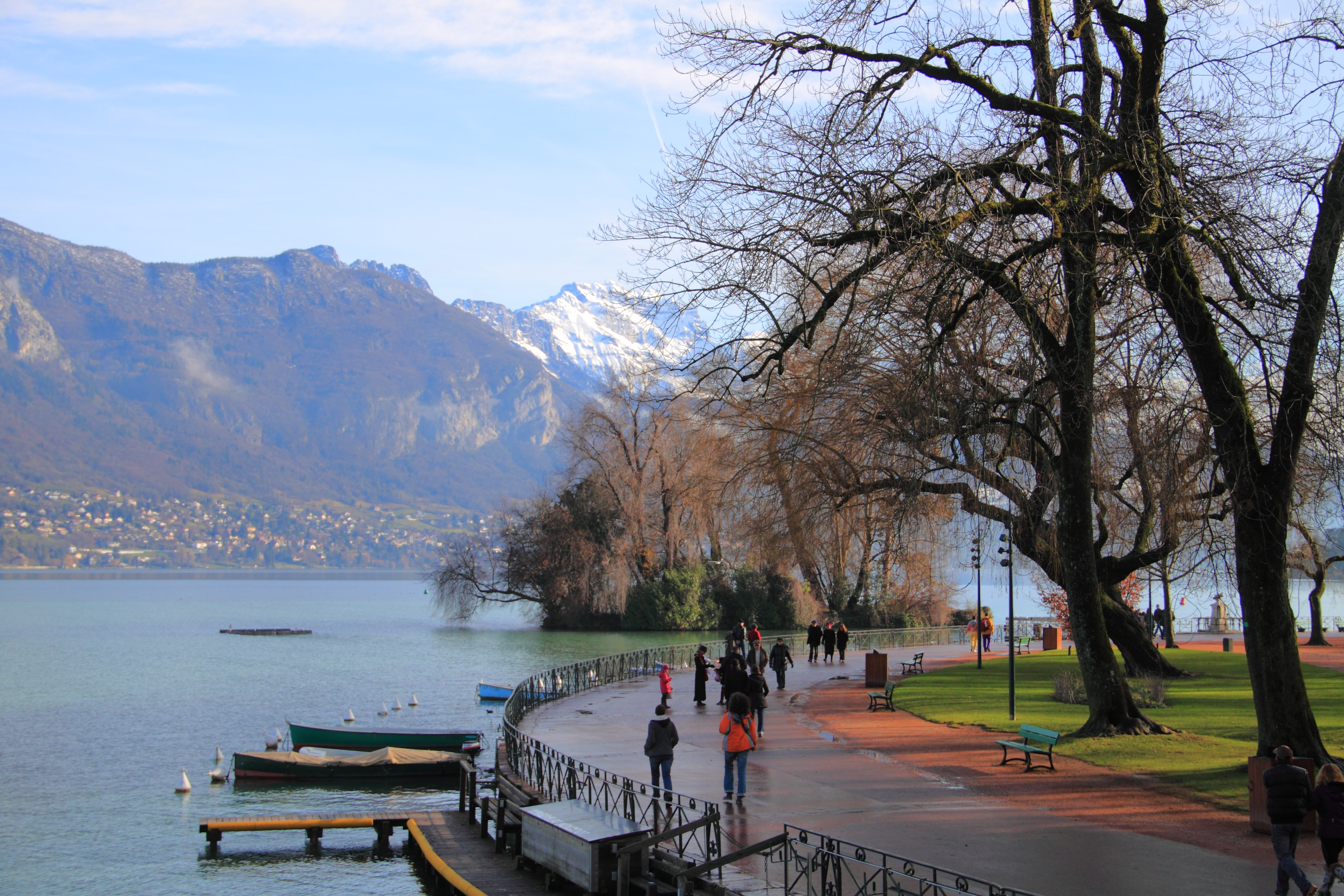 Lac d'Annecy